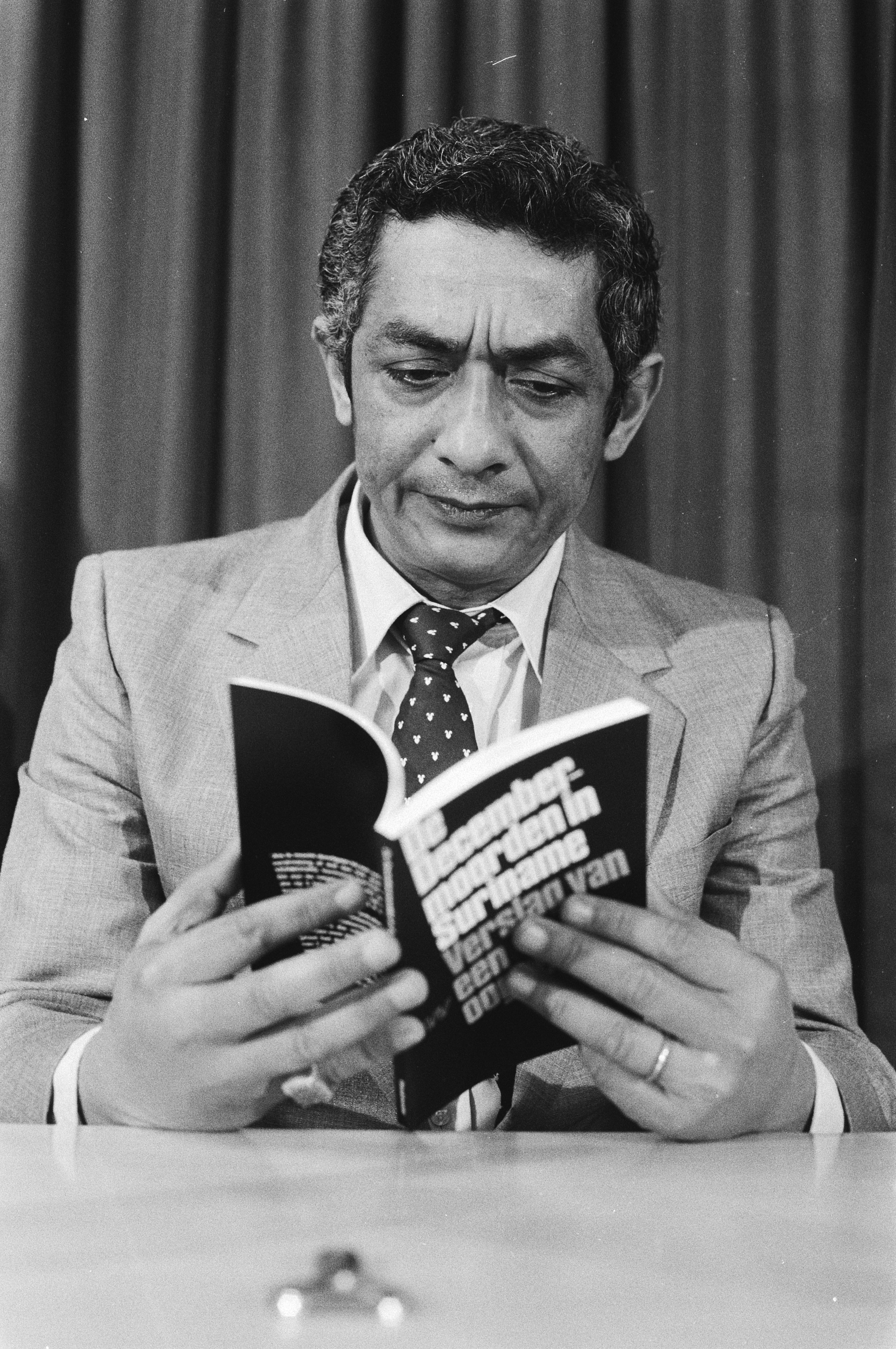 Aanbieding van het eerste exemplaar van het boek "De decembermoorden in Suriname" van Jan Sariman aan de voorzitter van de Raad voor de bevrijding van Suriname, dhr. Chin A Sen, 16 mei 1983